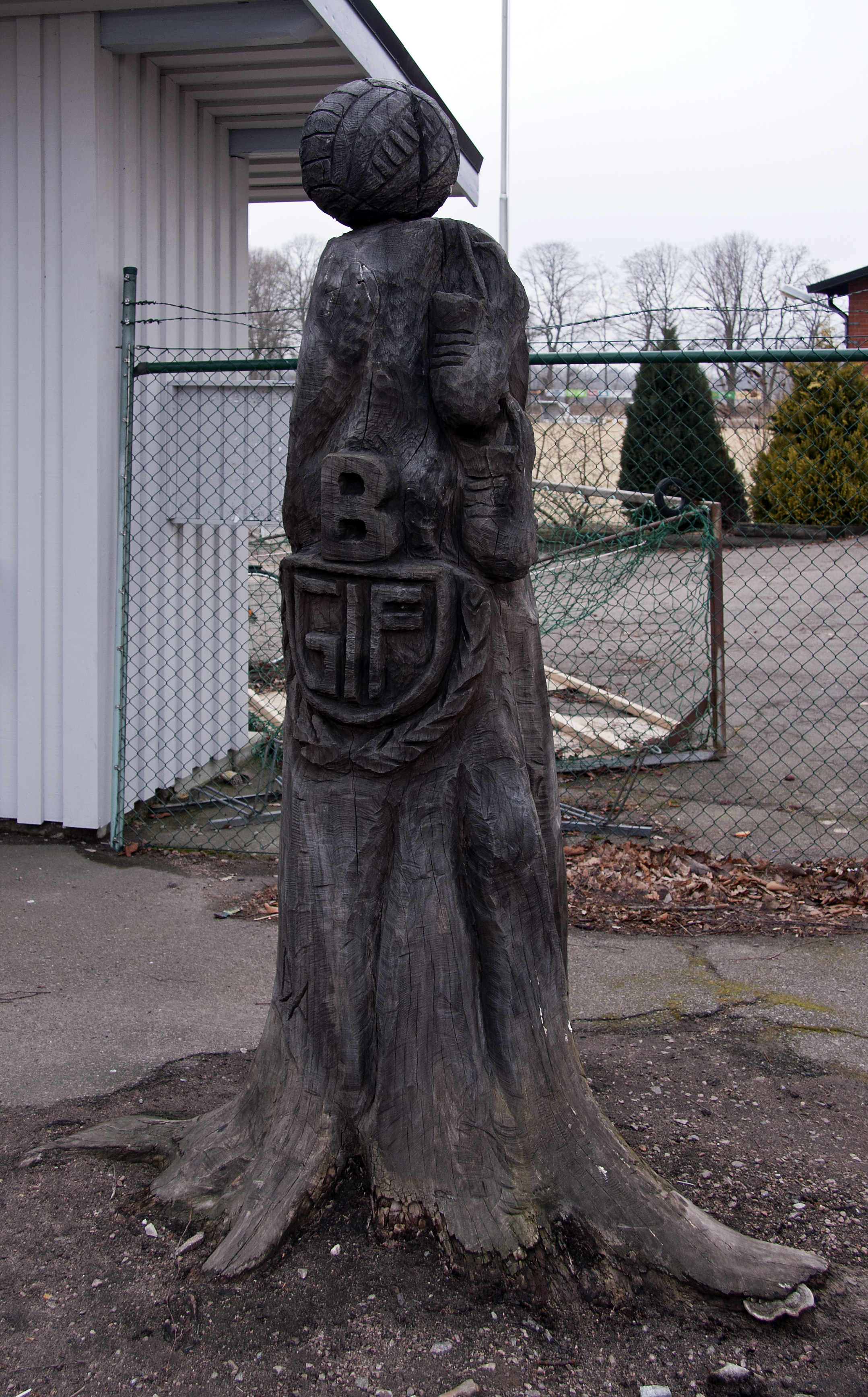 Klubbemblem för Billesholms GIF på ett konstverk vid idrottsplatsen. Har ej funnit uppgift om upphovsman.